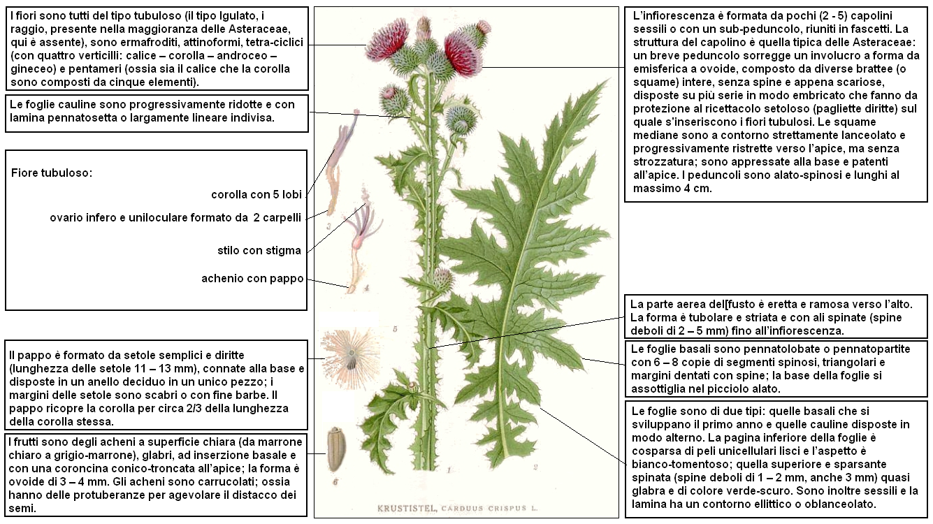 Carduus crispus Lindman DESC